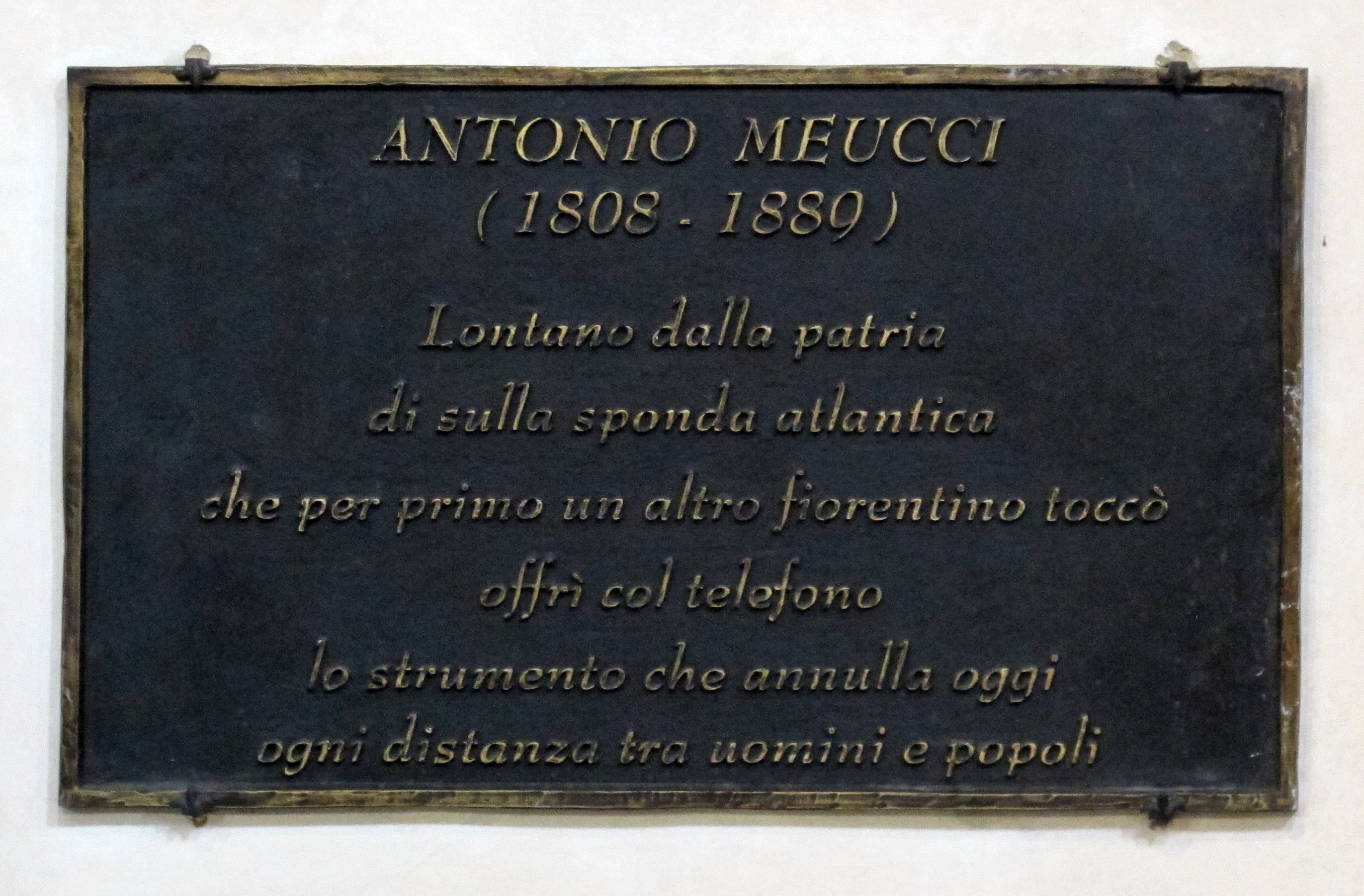 Santa croce, lapide ad antonio meucci